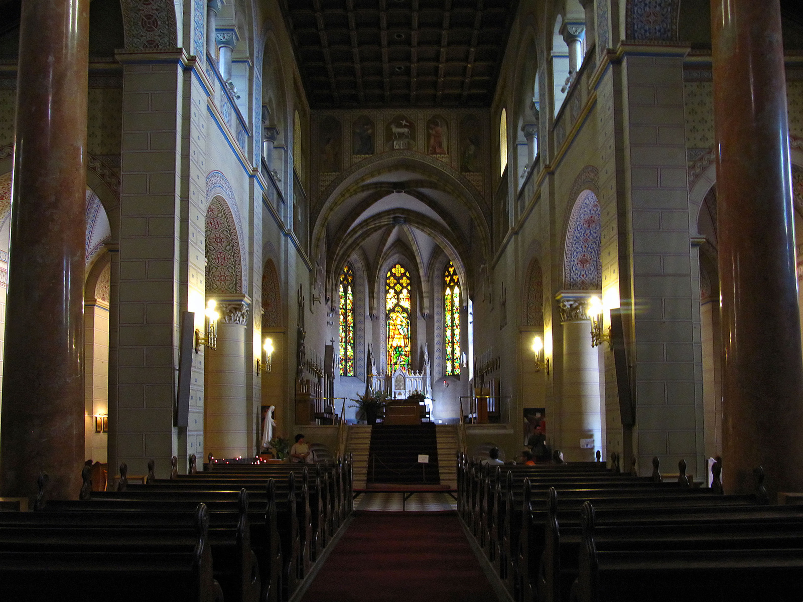 Székesegyház (Veszprém, Vár u.) This is a photo of a monument in Hungary, Identifier: 10682